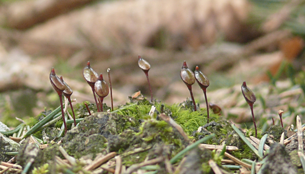 Buxbaumia aphylla, Schwäbisch-Fränkische Waldberge